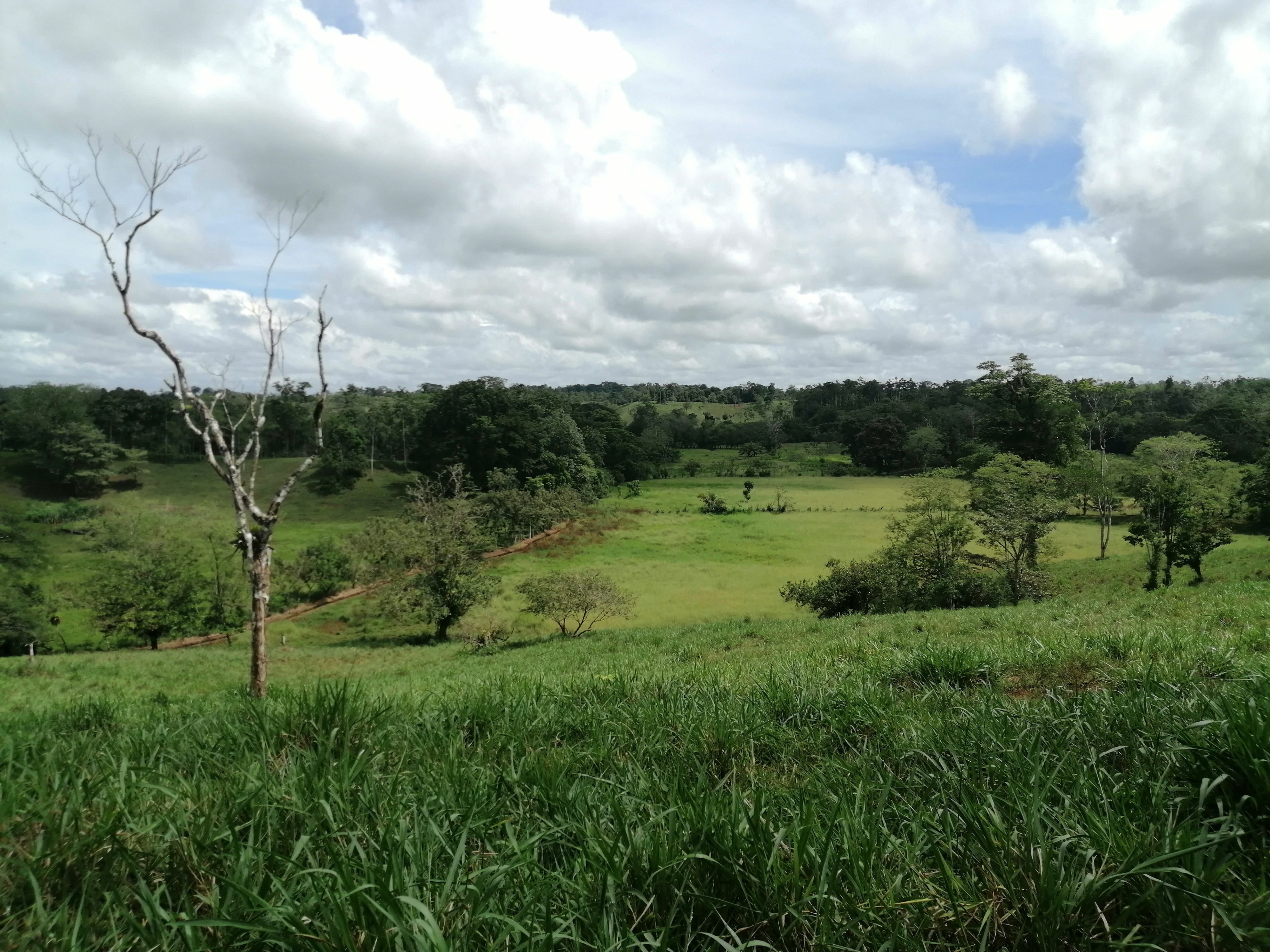 Llanuras del río purgatorio.